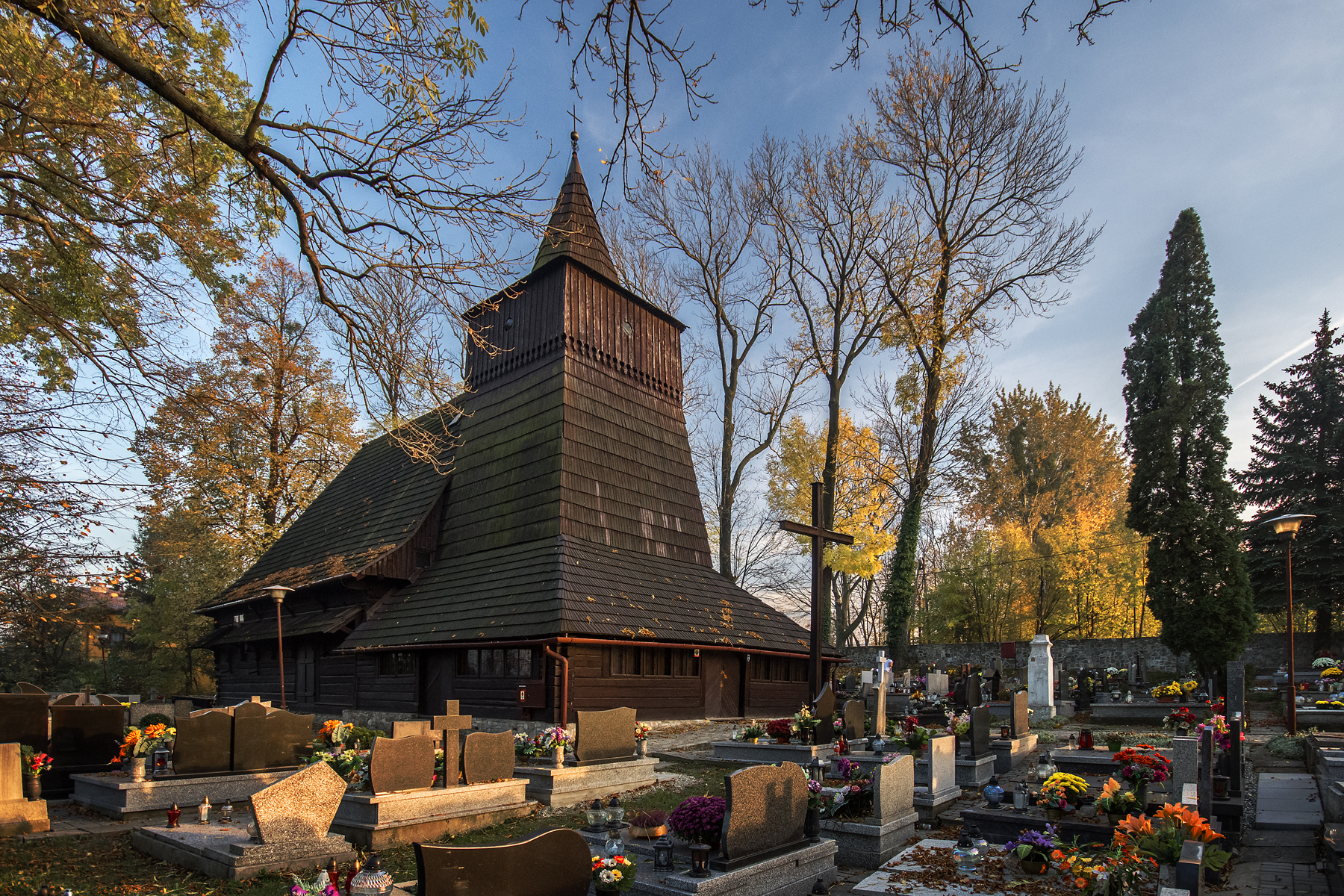 Zamarski, kościół par. pw. św. Rocha, 1 poł. XVIII w.